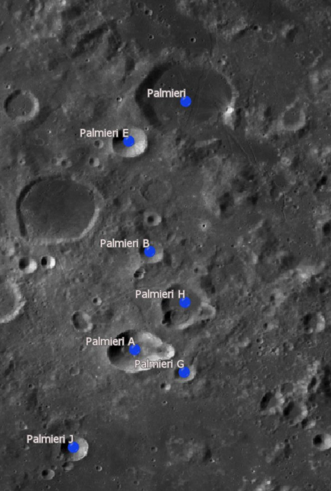 Cráter lunar Palmieri. Cráteres satélite. (Imagen LRO)